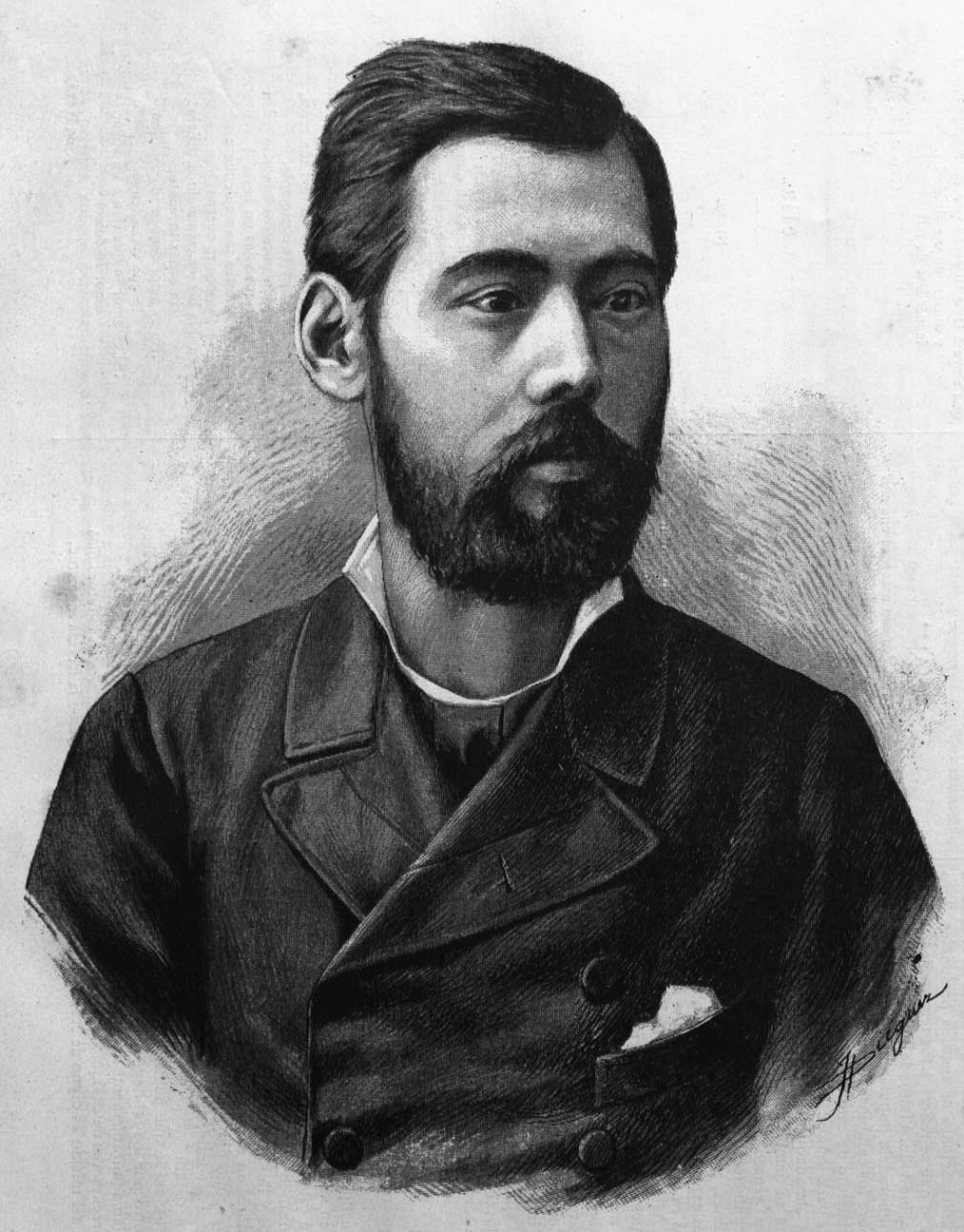 大越成徳 バルセルナ万国博覧会理事官、リヨン領事